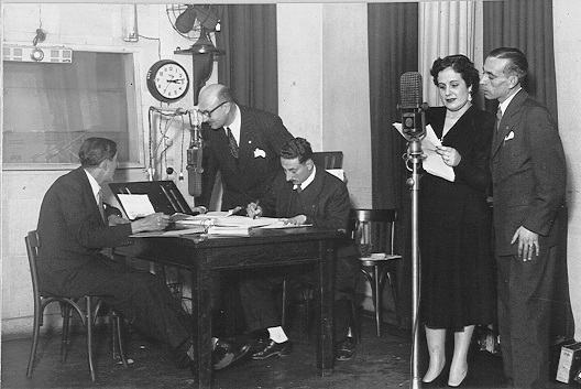 Maruxa Boga e Tacholas no micrófono, Alfredo Arostegui e outros dous compoñentes da audición Recordando a Galicia